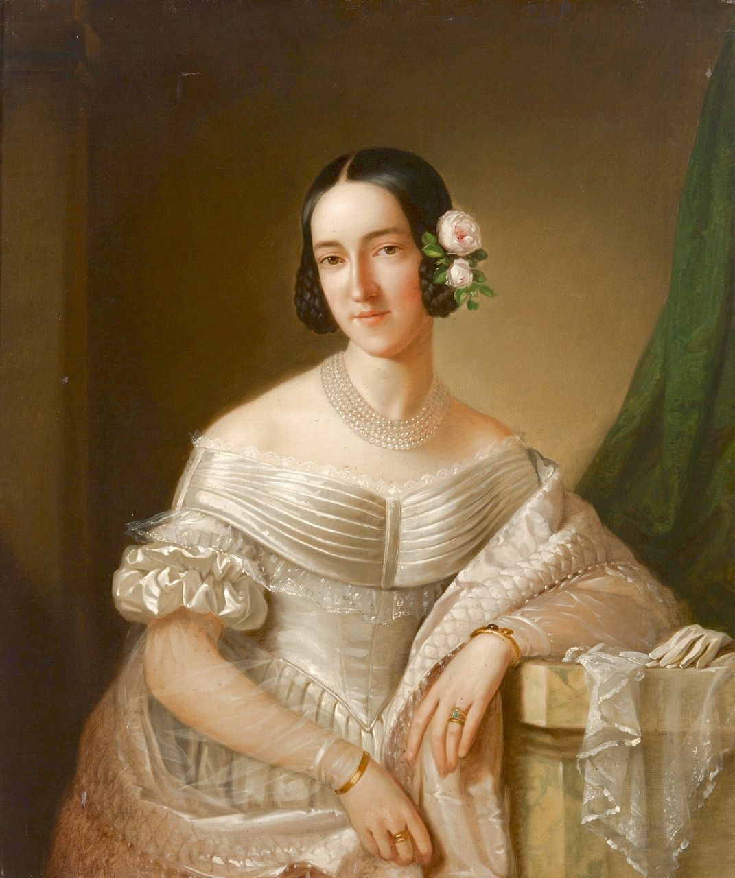 Ritratto di Hermine di Austria